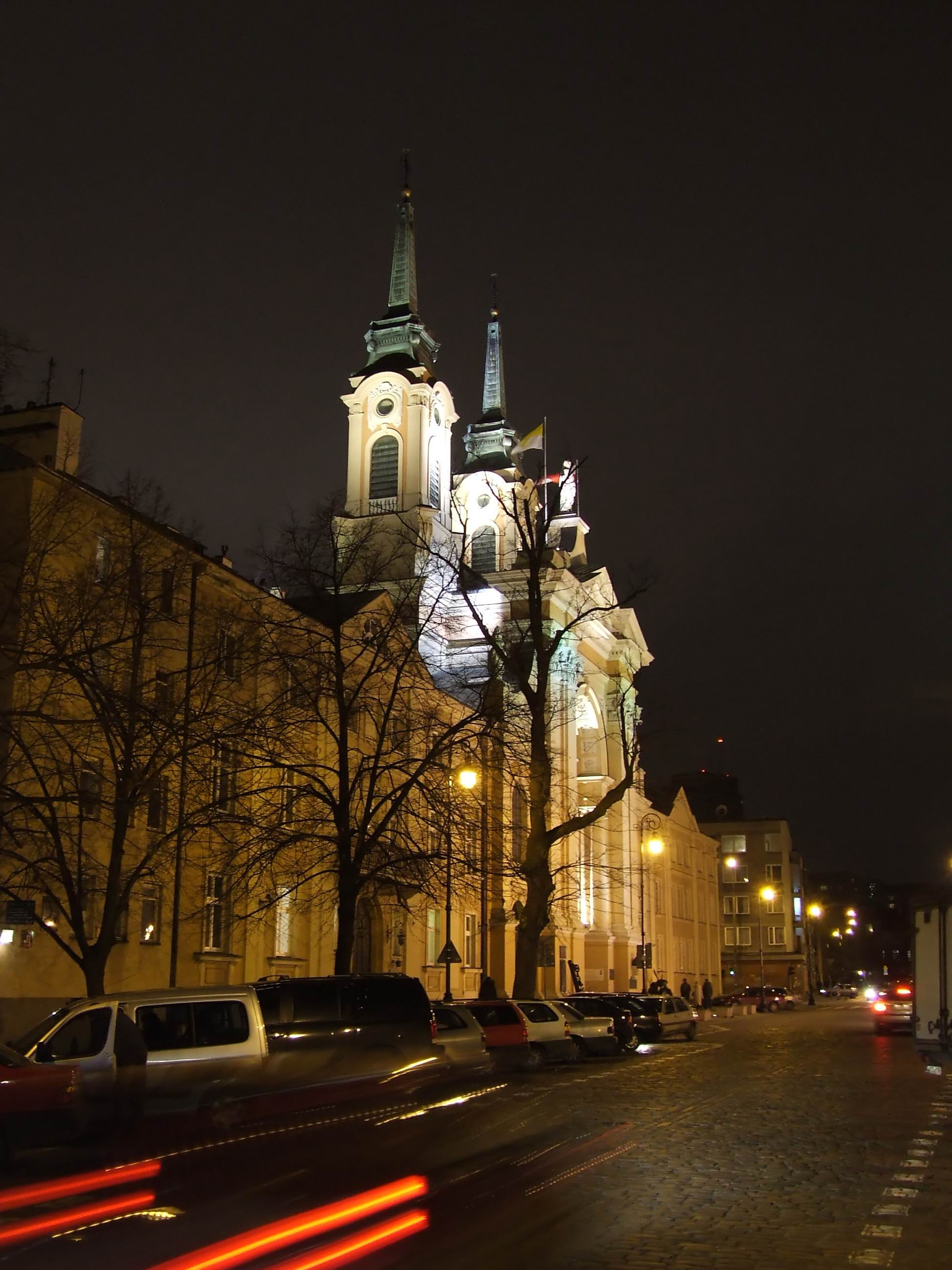 Kościół pw. Najświętszej Maryji Panny Królowej Polski